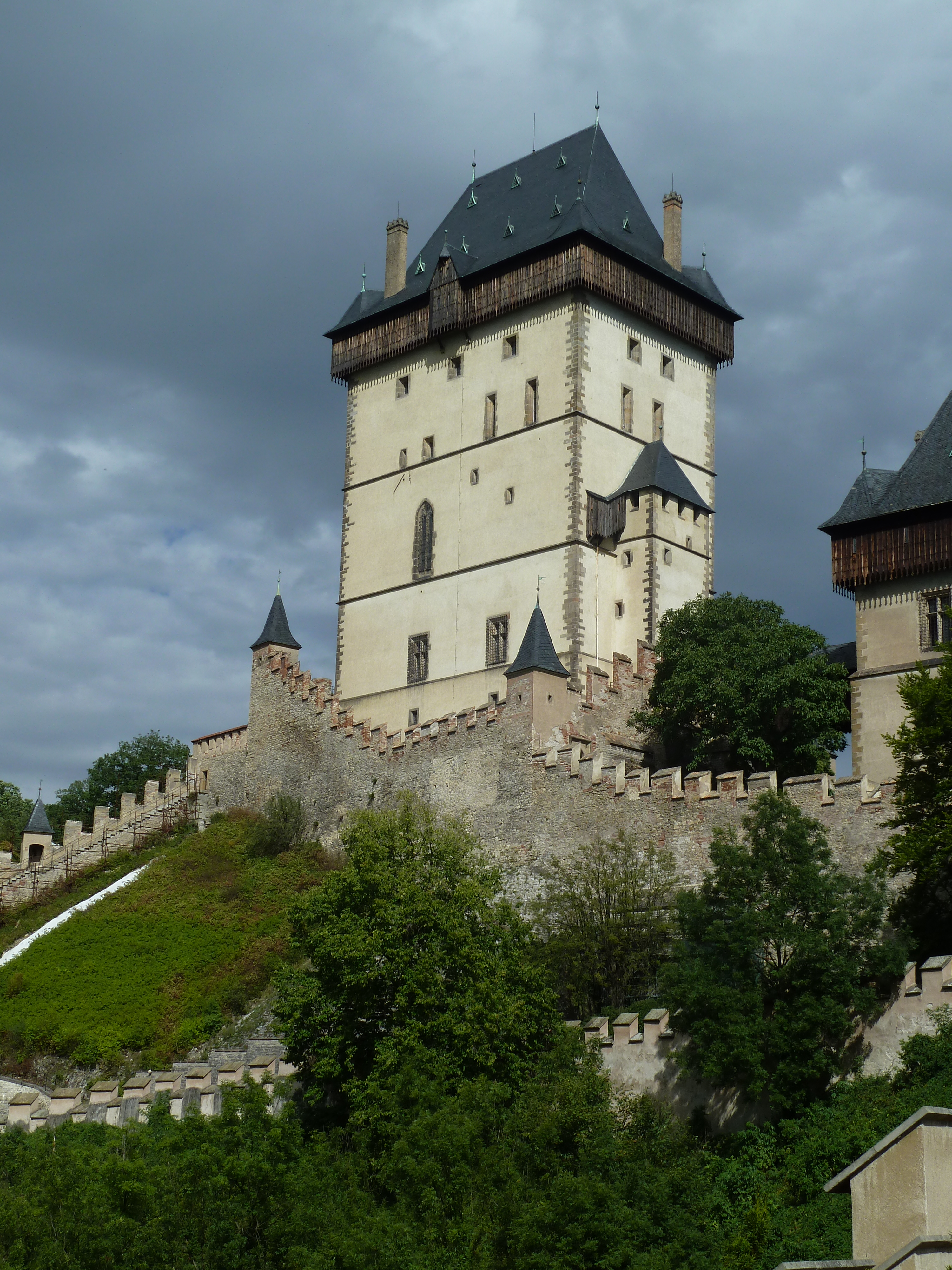 Hrad Karlštejn (Karlštejn), Karlštejn 172